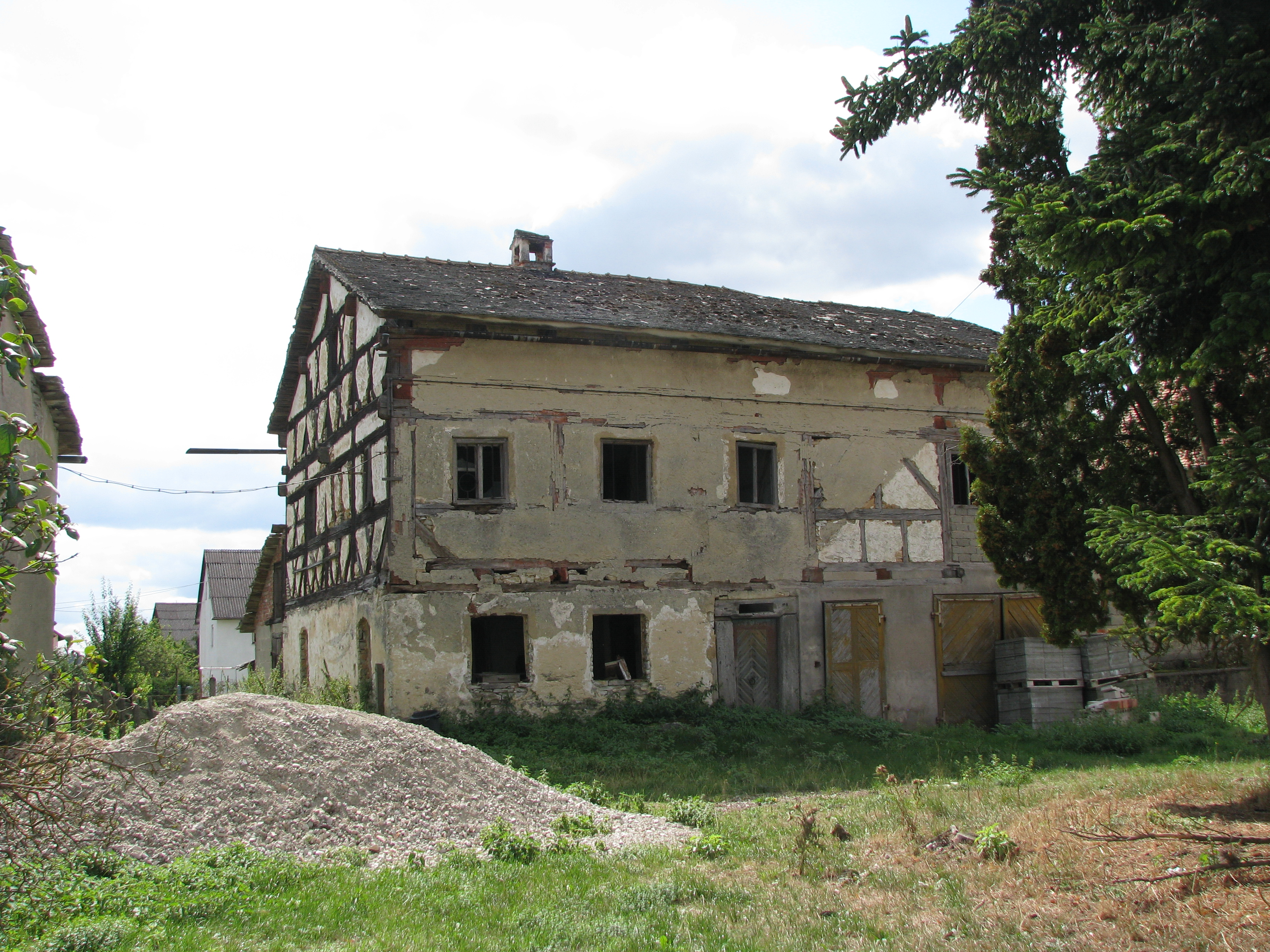 Linden, Ortsteil von Greding im mittelfränkischen Landkreis Roth in Bayern, Fachwerk-Wohnstallhaus